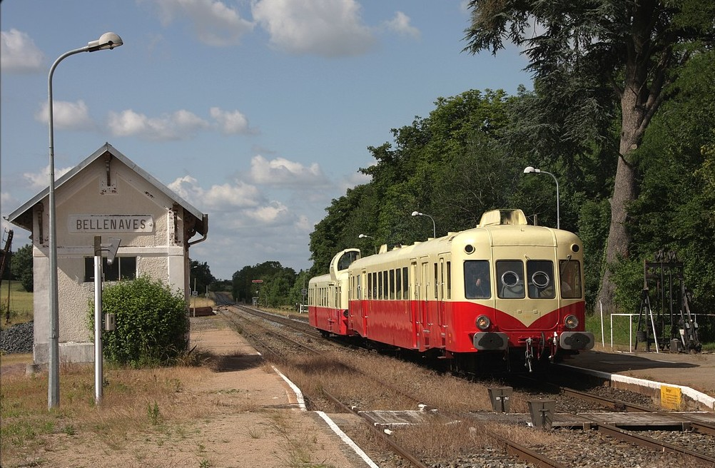 Arrêt en gare de Bellenaves du X2403 jumelé avec l'X4039 de retour de Montluçon